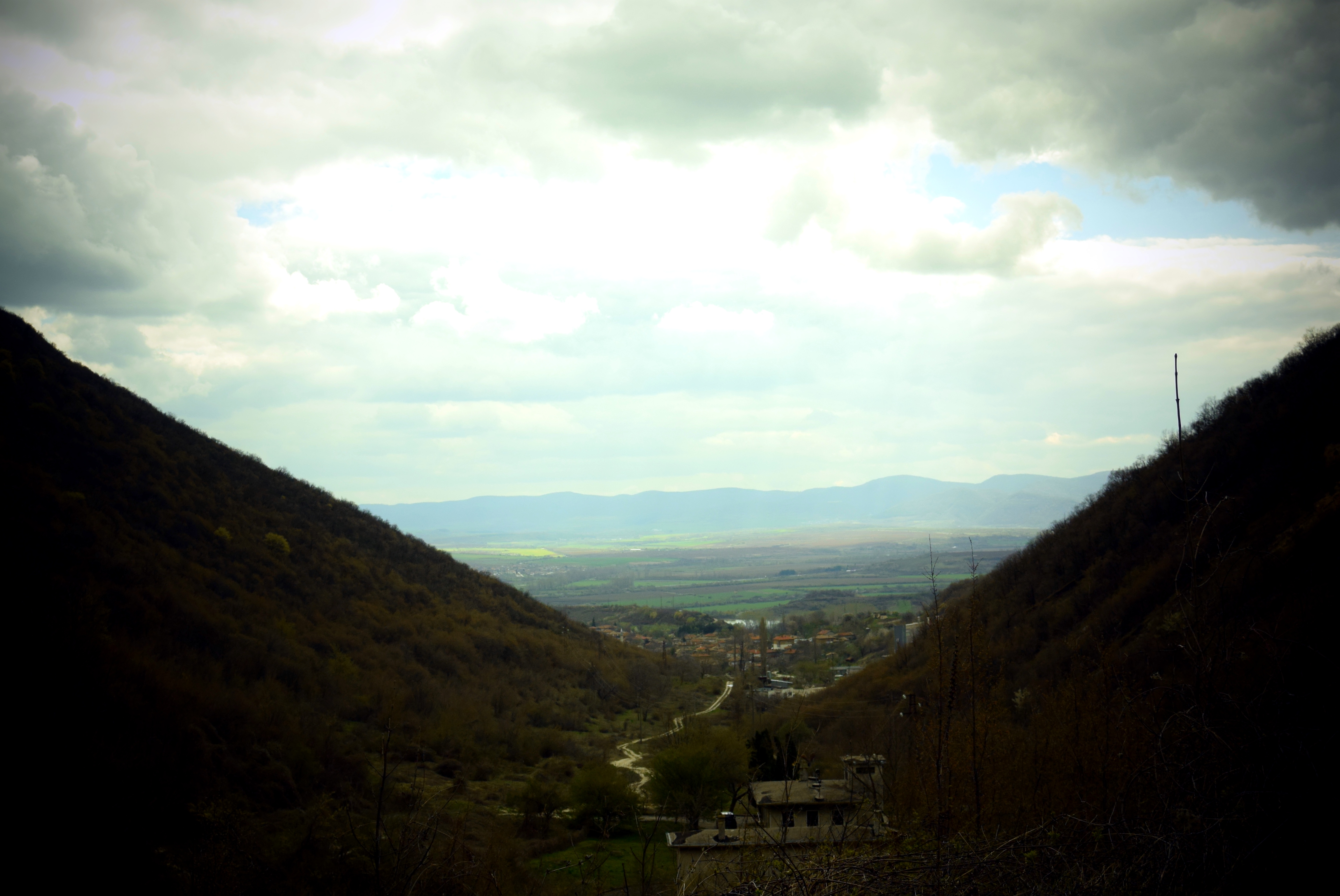 Шуменско плато